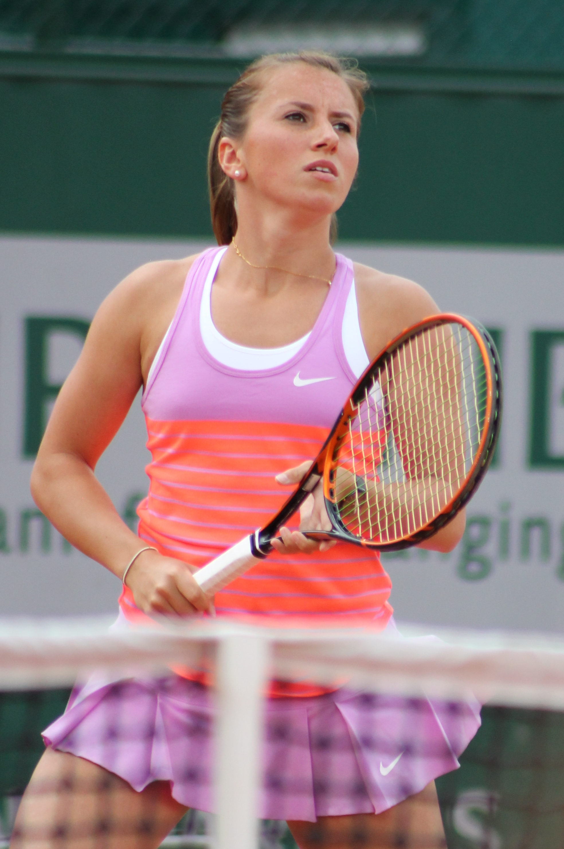 Beck RG15 (7)